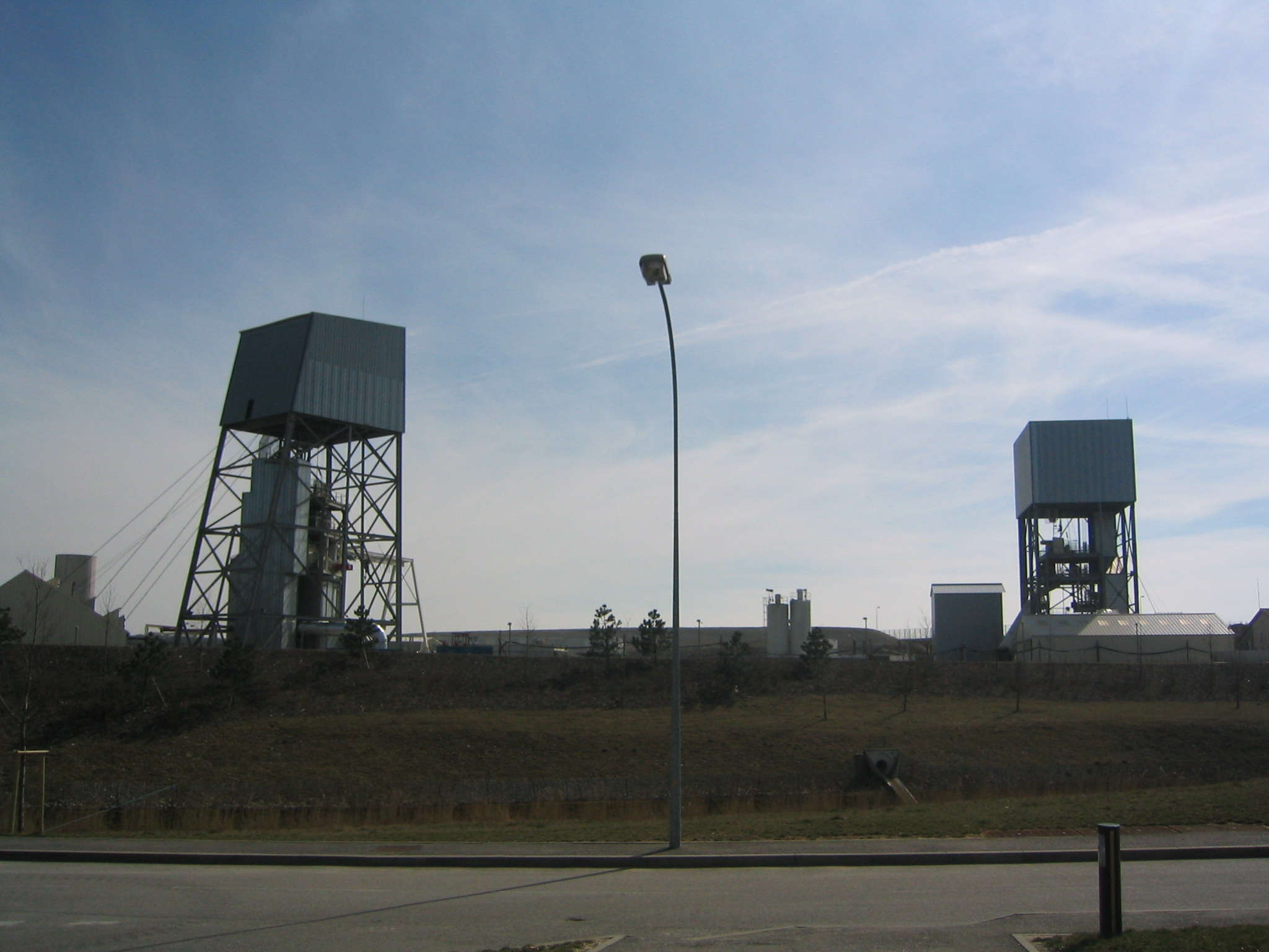 L'accès au laboratoire souterrain de l'ANDRA à Bure dans la Meuse, tel qu'il était en mars 2005. Les chevalements de fonçage des puits ont depuis été remplacés par les structures définitives plus basses